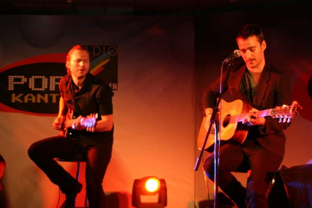 Radiokonzert